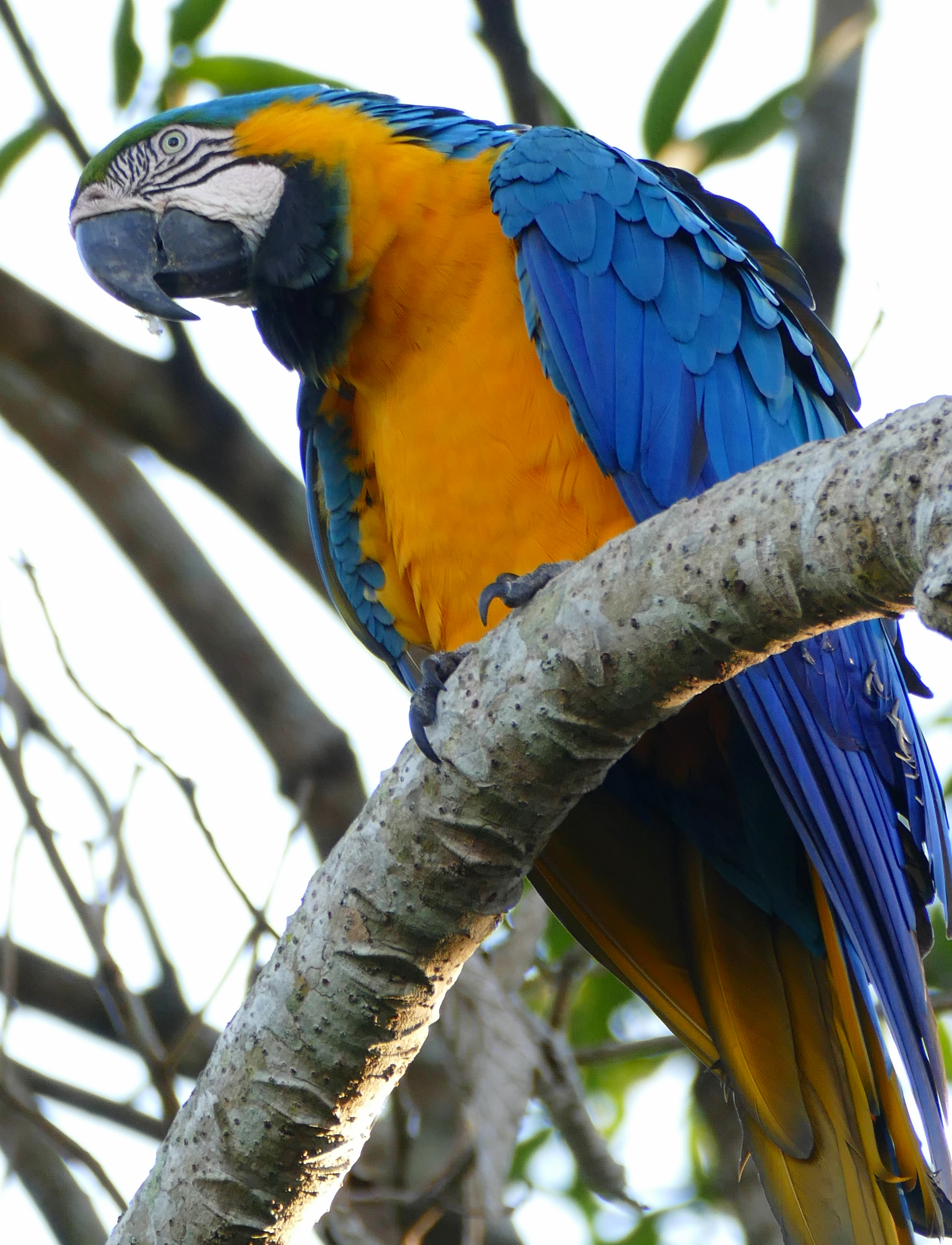 Pousada Rio Claro, Transpantaneira, Poconé, Mato Grosso, BRAZIL